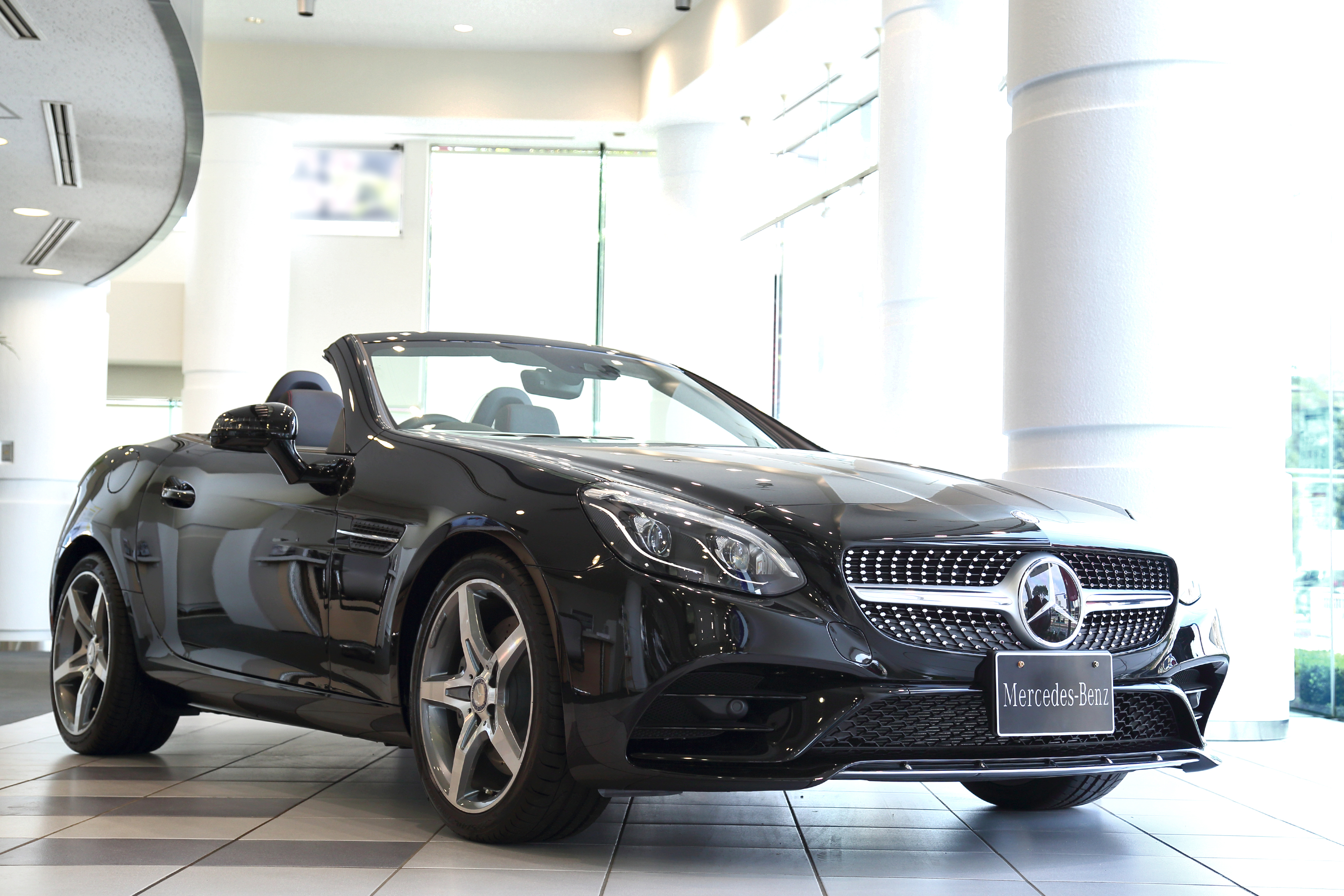 メルセデス・ベンツ・SLKクラス（R172）のマイナーチェンジ車であるja:メルセデス・ベンツ・SLCクラスの左正面画像。